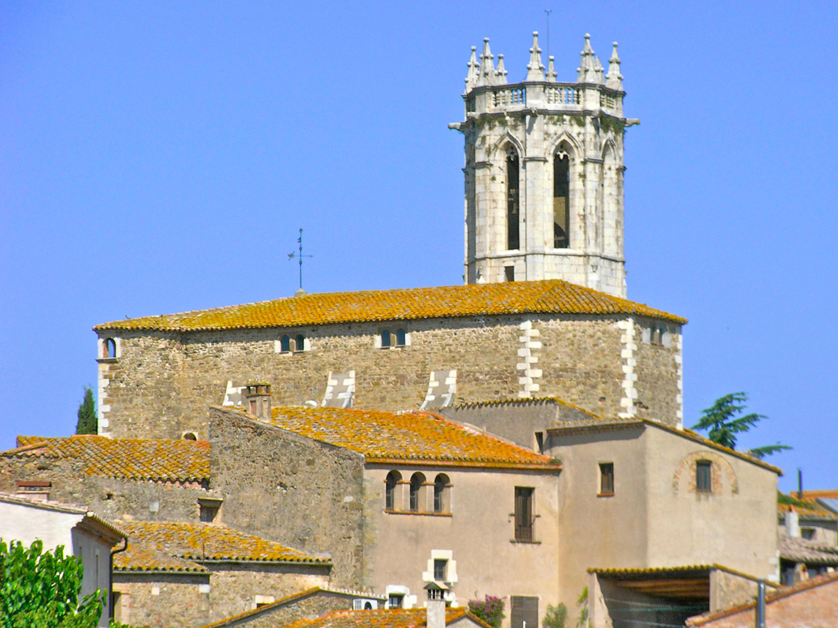 Església de Sant Isidor de la Pera, a l'Empordà